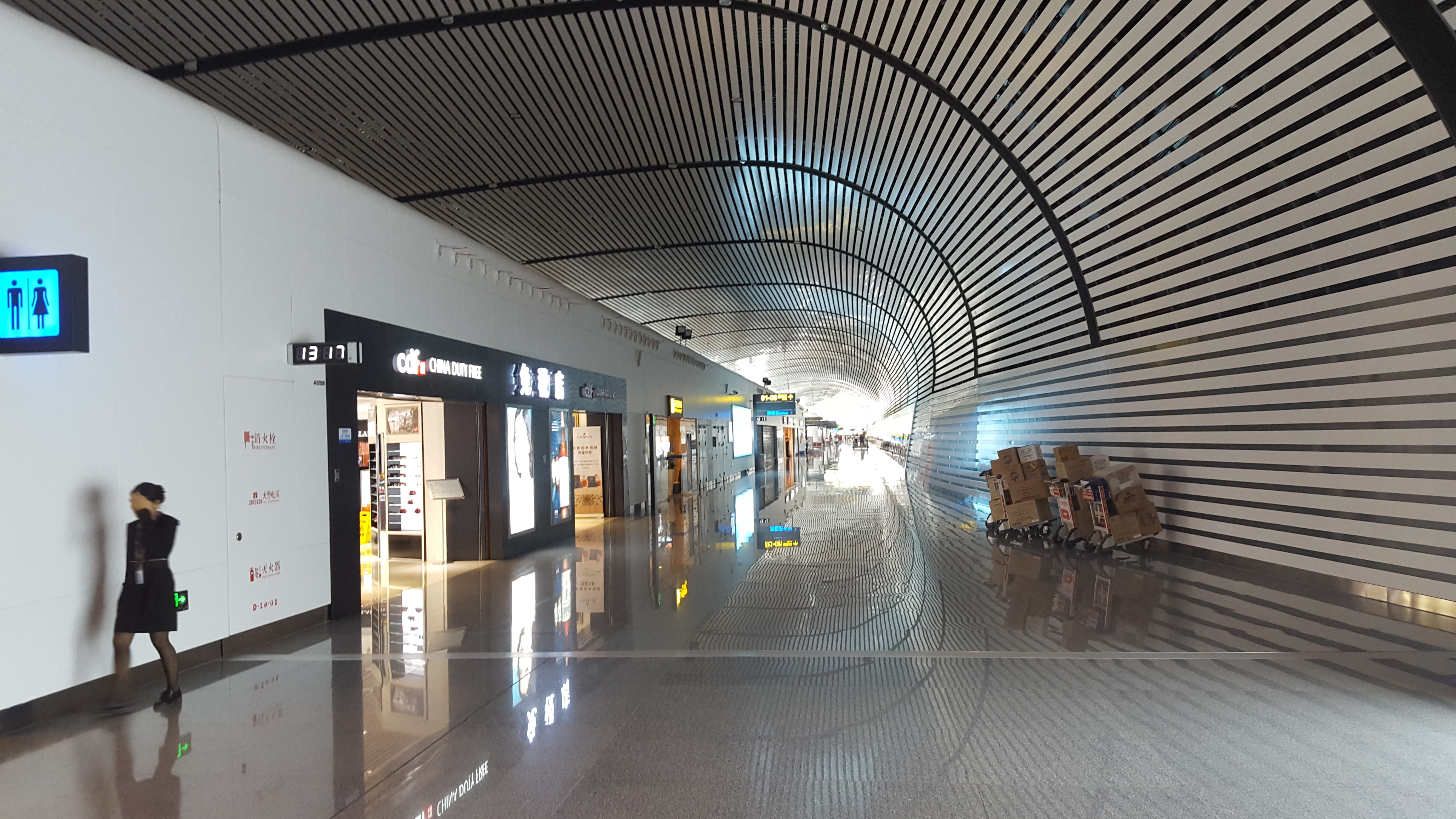 коридор в зону беспошлинной торговли